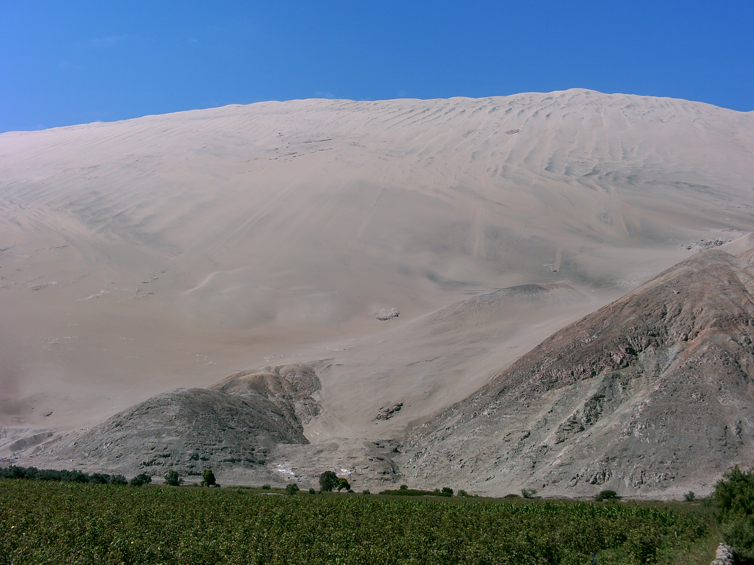 Los Abismos de El Toro Mata - 2008